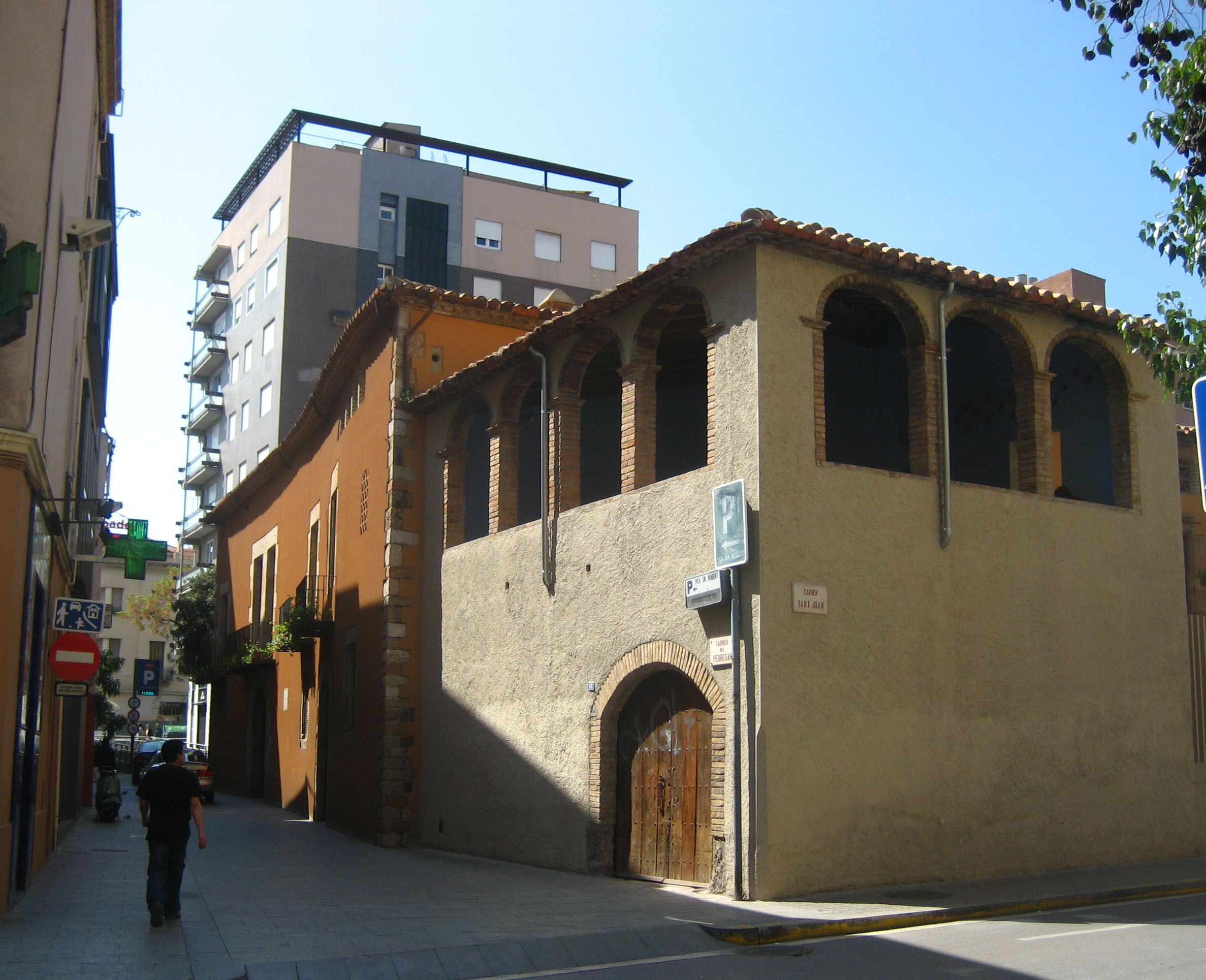 Casa Duran in Sabadell, built in 1606, Catalonia